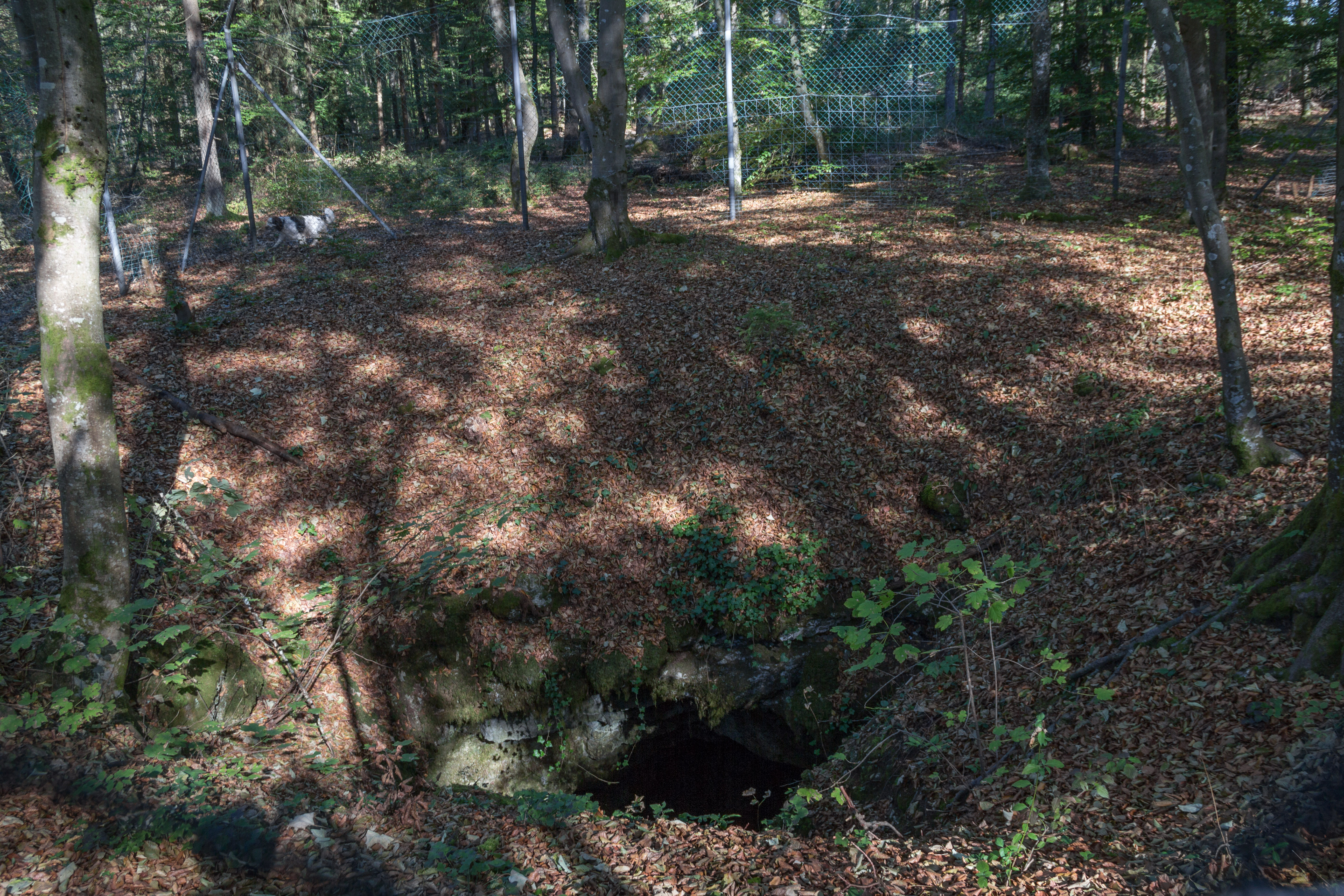 Höhle, Hohlloch, Raitenbuch